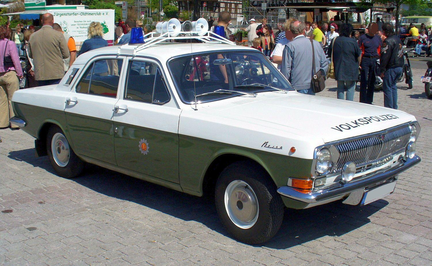 ein Streifenwagen der ehemaligen Volkspolizei der Bauart GAZ-24 Wolga auf einer Ausstellung alter Kraftfahrzeuge (oder auch sogenannter Oldtimer)